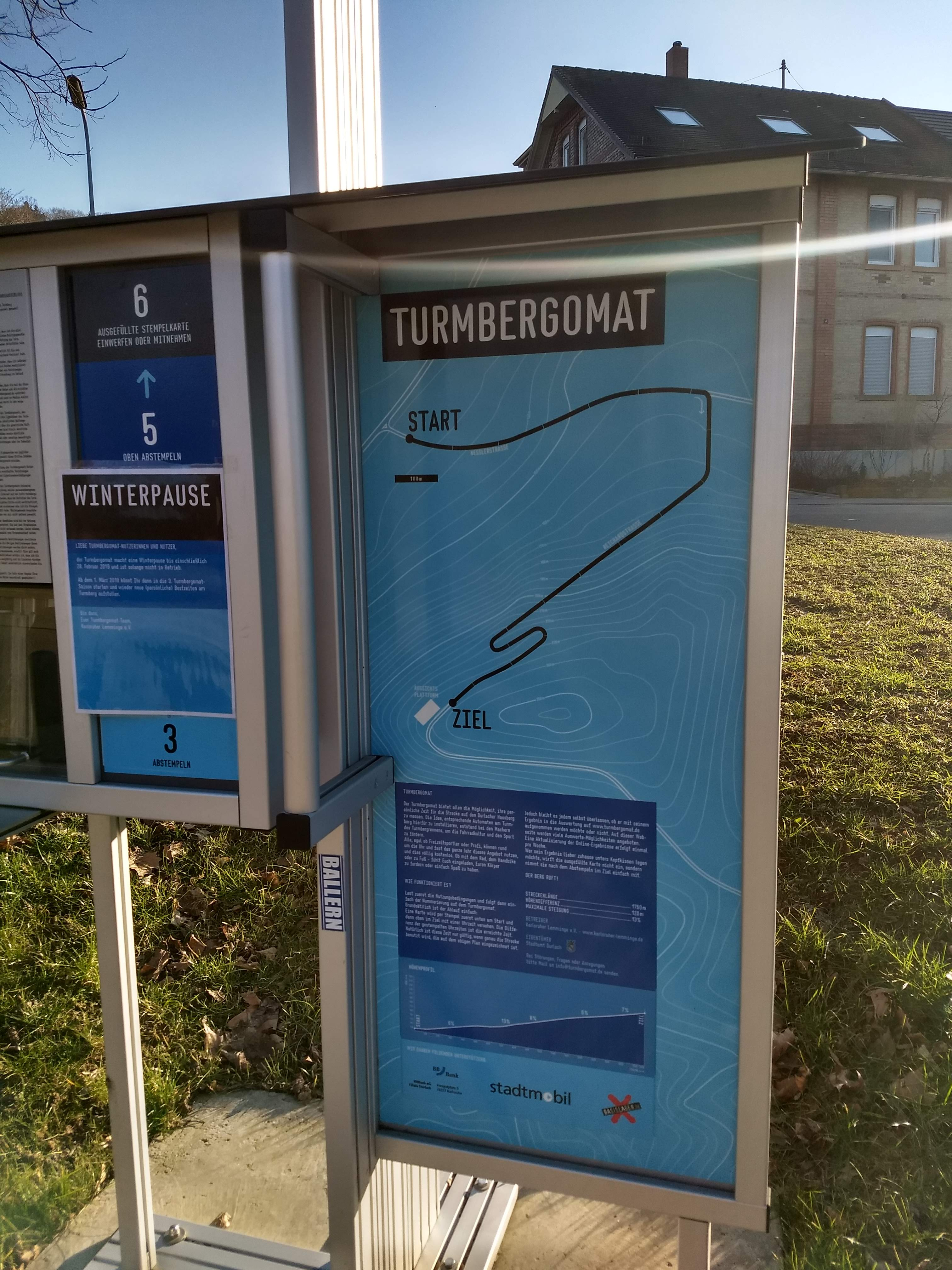 Der Turmbergomat ist eine Zeitmessanlage für Hobby-Radsportler und Hobby-Läufer, die eine Strecke von 1.750 m und rund 120 Höhenmeter zurücklegen wollen.